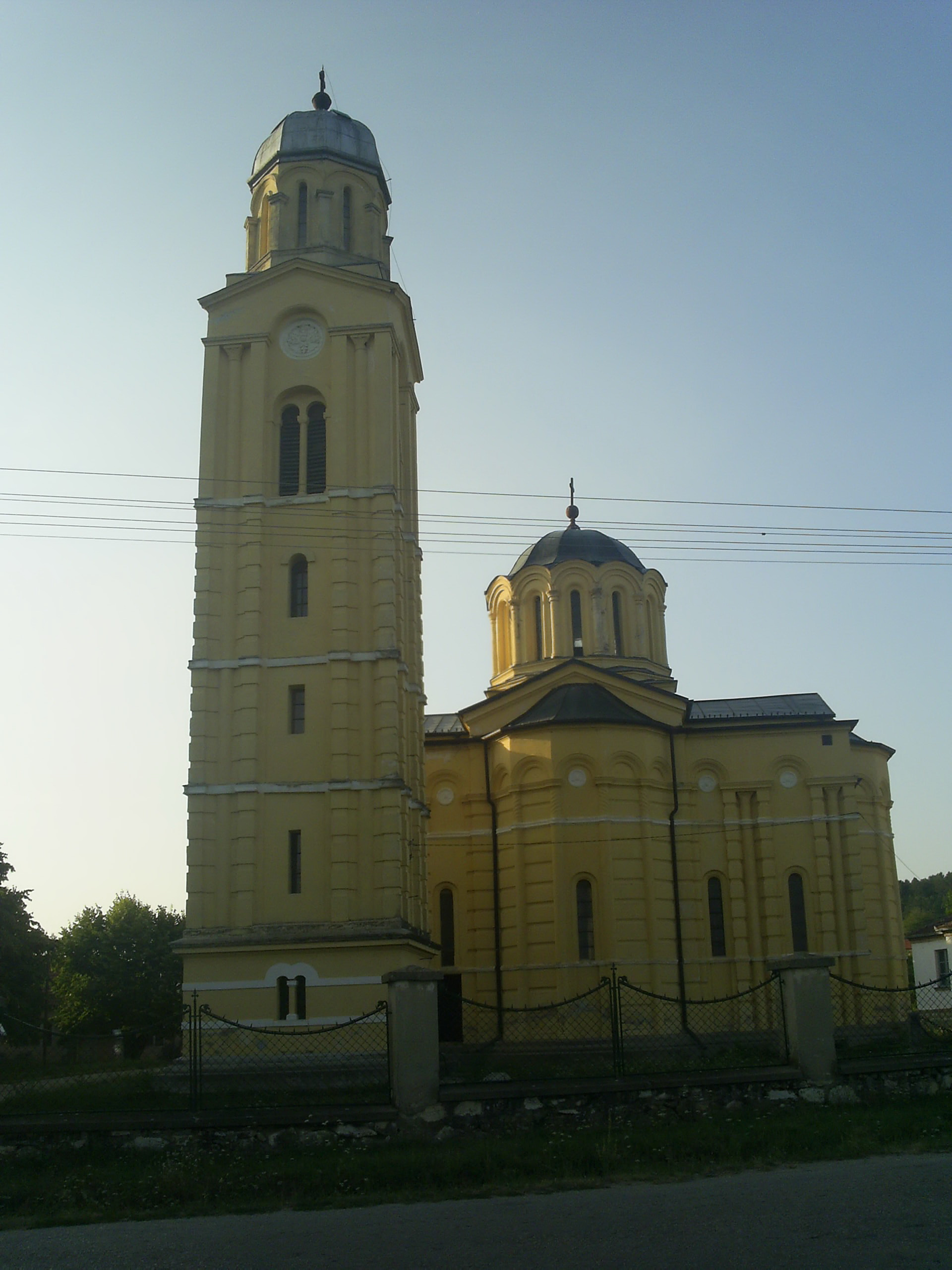 Црква у Бадњевцу